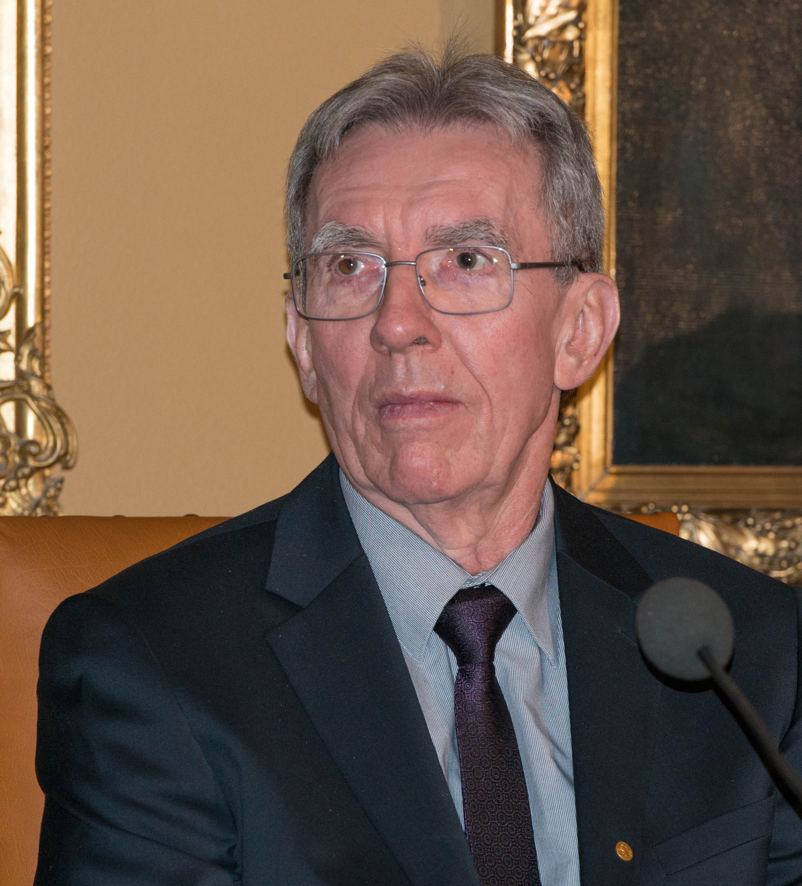 Nobel Prize 2016 Nobel Laureates 2016 Jean-Pierre Sauvage